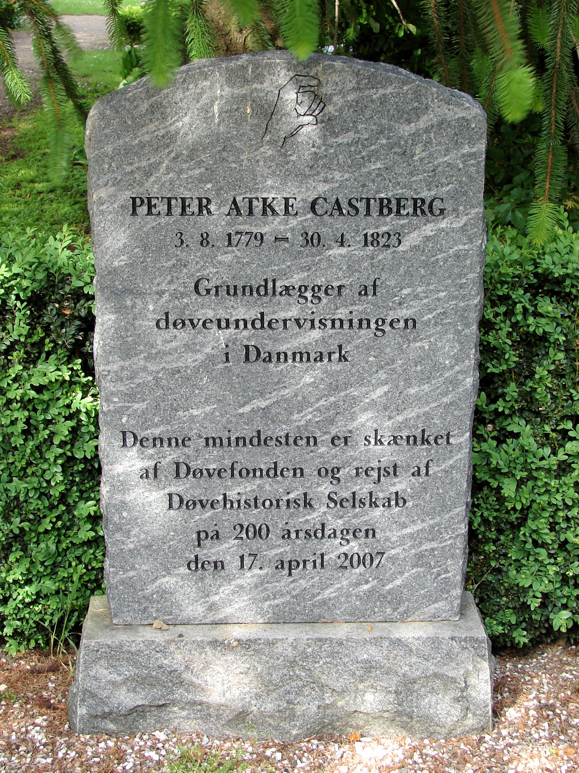 Peter Atke Castberg, grundlægger af døveundervisningen i Danmark. Født 3. august 1779 i Flekkefjord i Norge, 30. april 1823 i København, Assistens Kirekgård, Nørrebro, København